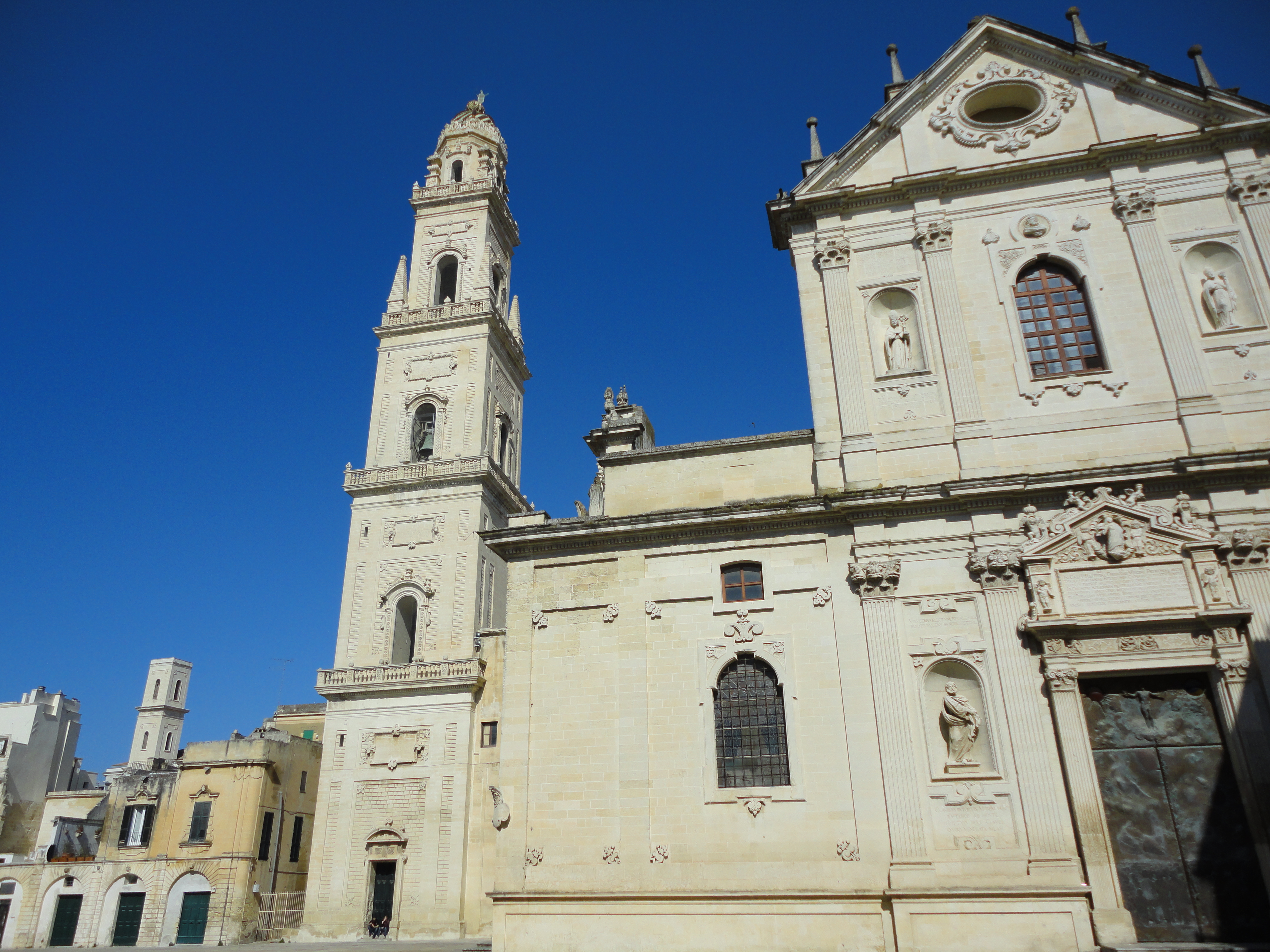 Cattedrale e Campanile di Lecce